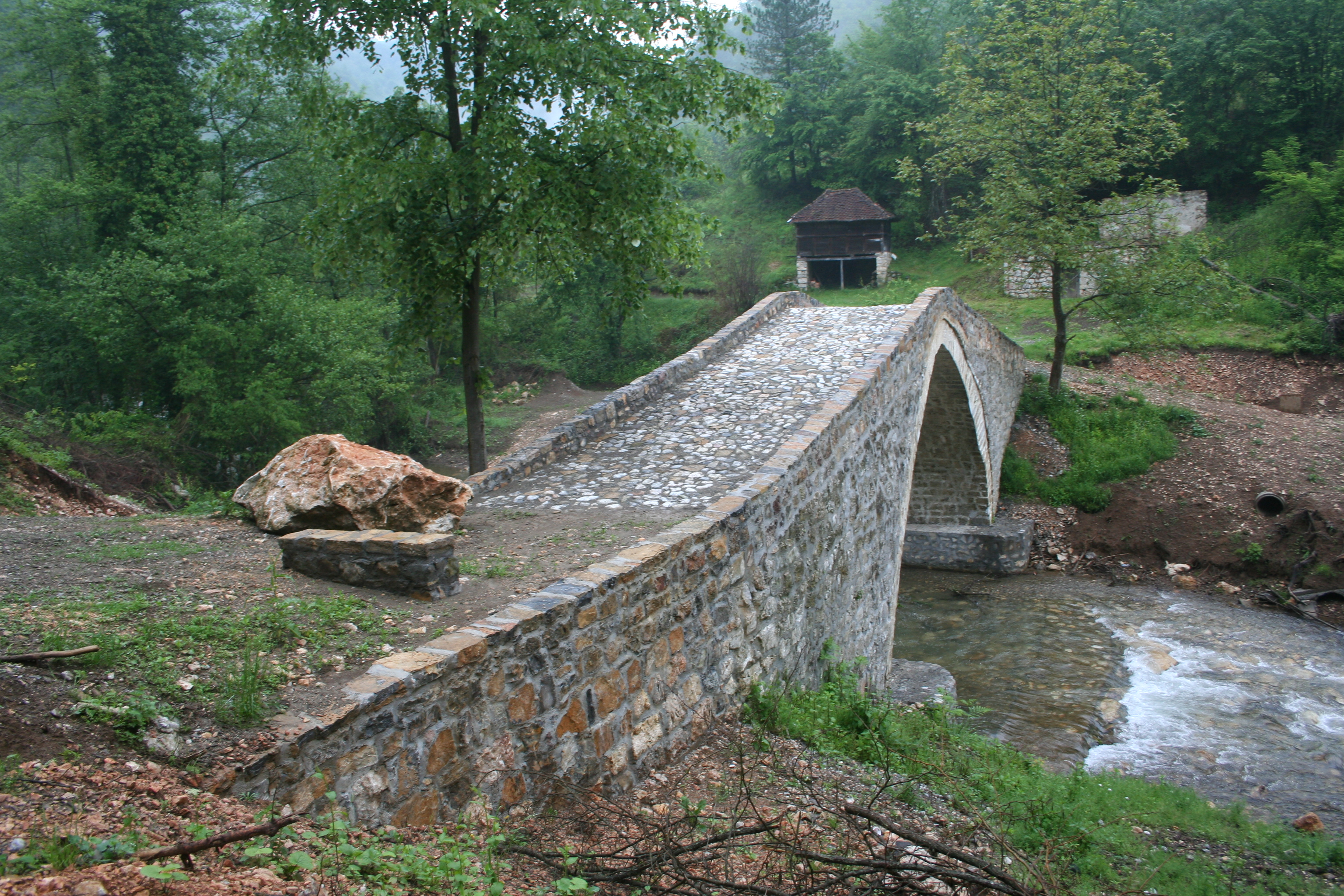 Kameni most (Rimski most) u Donjoj Orovici, Ljubovija